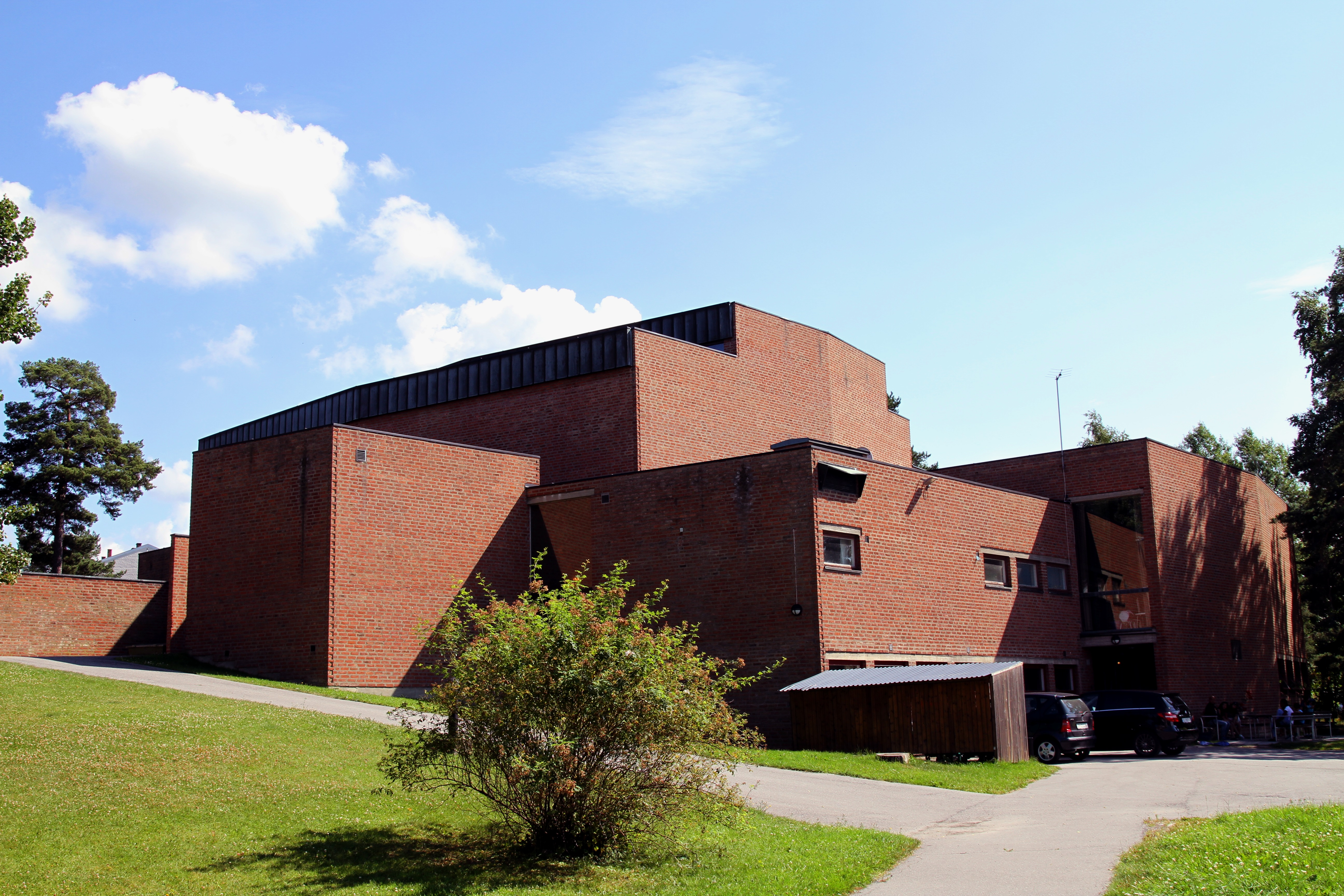 Lambertseter kirke i Oslo.